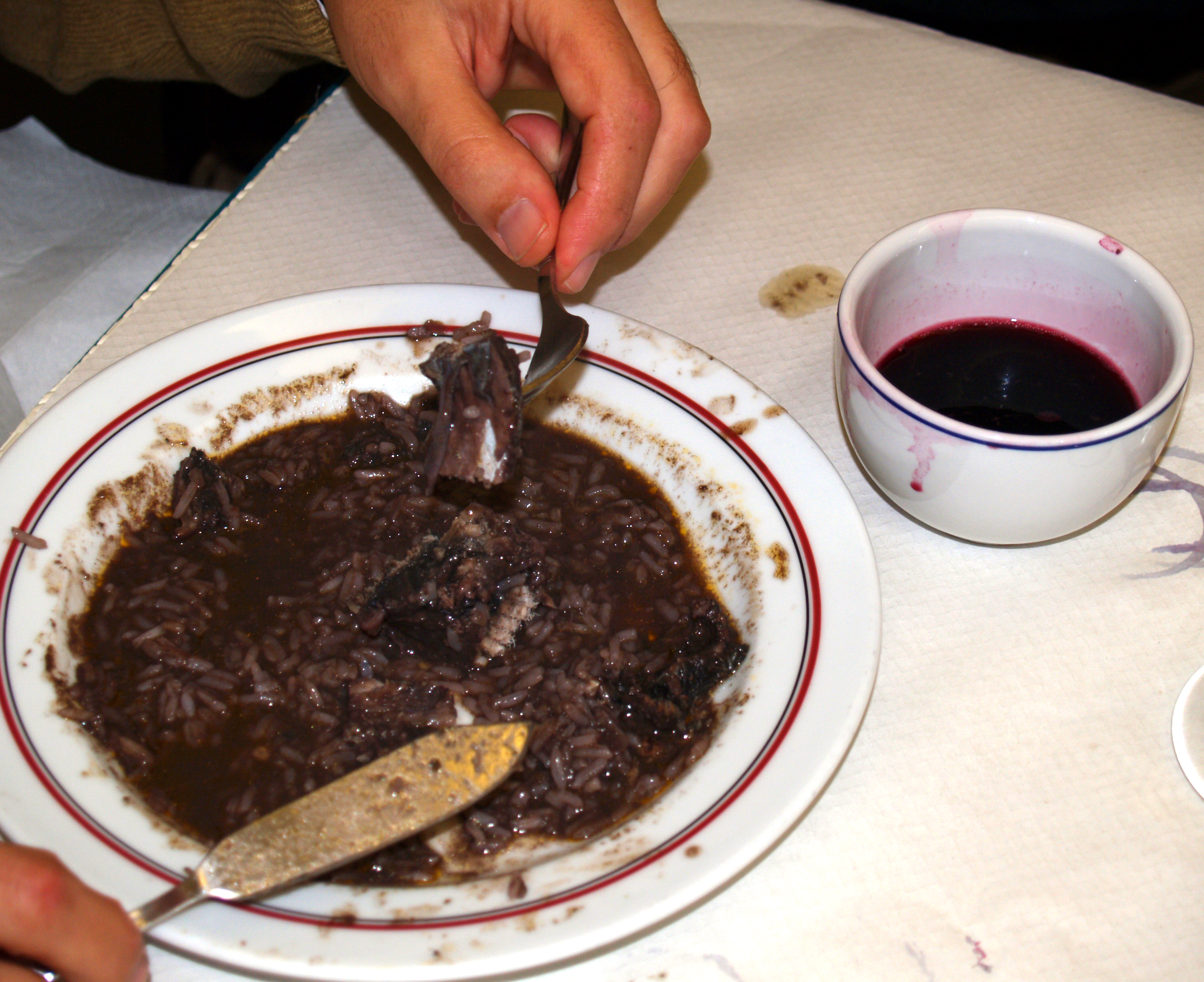 Gastronomie au Portugal